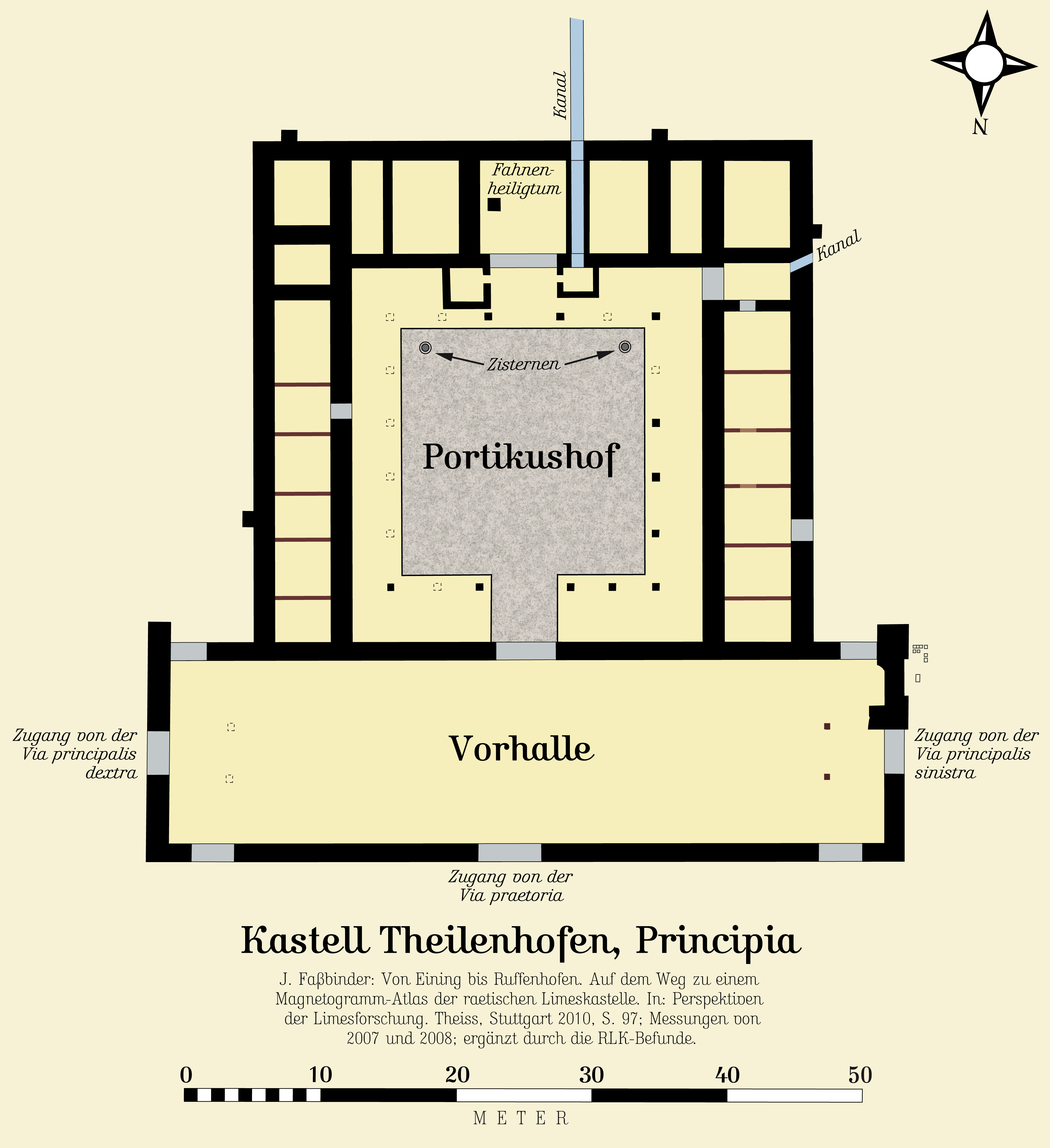 Principia im limesnahen Kastell Theilenhofen, Bayern. Hergestellt am Macintosh unter Macromedia Freehand MX; abgespeichert für Wikipedia unter Adobe Photoshop CS 2. Quelle: Heinrich Eidam: Das Kastell Theilenhofen. In: Ernst Fabricius, Felix Hettner, Oscar von Sarwey (Hrsg.): Der obergermanisch-raetische Limes des Roemerreiches B VII Nr 71a, Petters, Heidelberg, 1905.